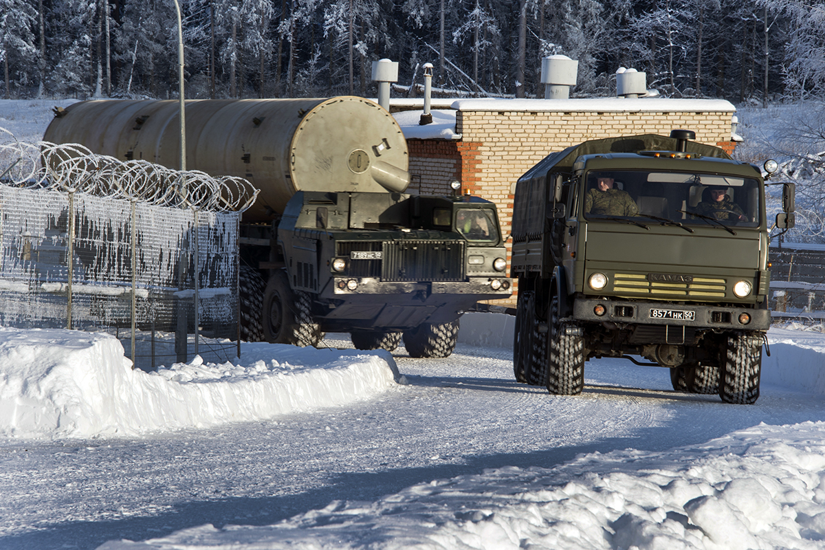 Транспортно-установочный агрегат 5Т92 комплекса противоракетной обороны А-135 «Амур» на шасси МАЗ-543М. Проведение тренировки боевыми расчётами системы ПРО 9-й дивизии противоракетной обороны.